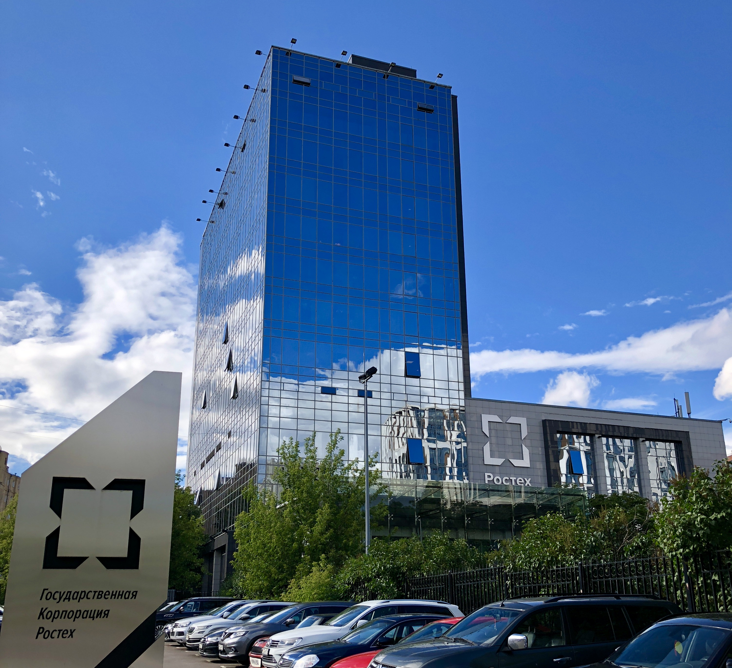 Офис Ростех в Москве